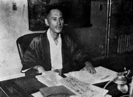 菊竹六鼓、編集長時代の執務風景